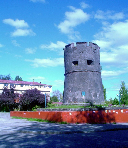 Torreón El Canelo, Valdivia, Chile)